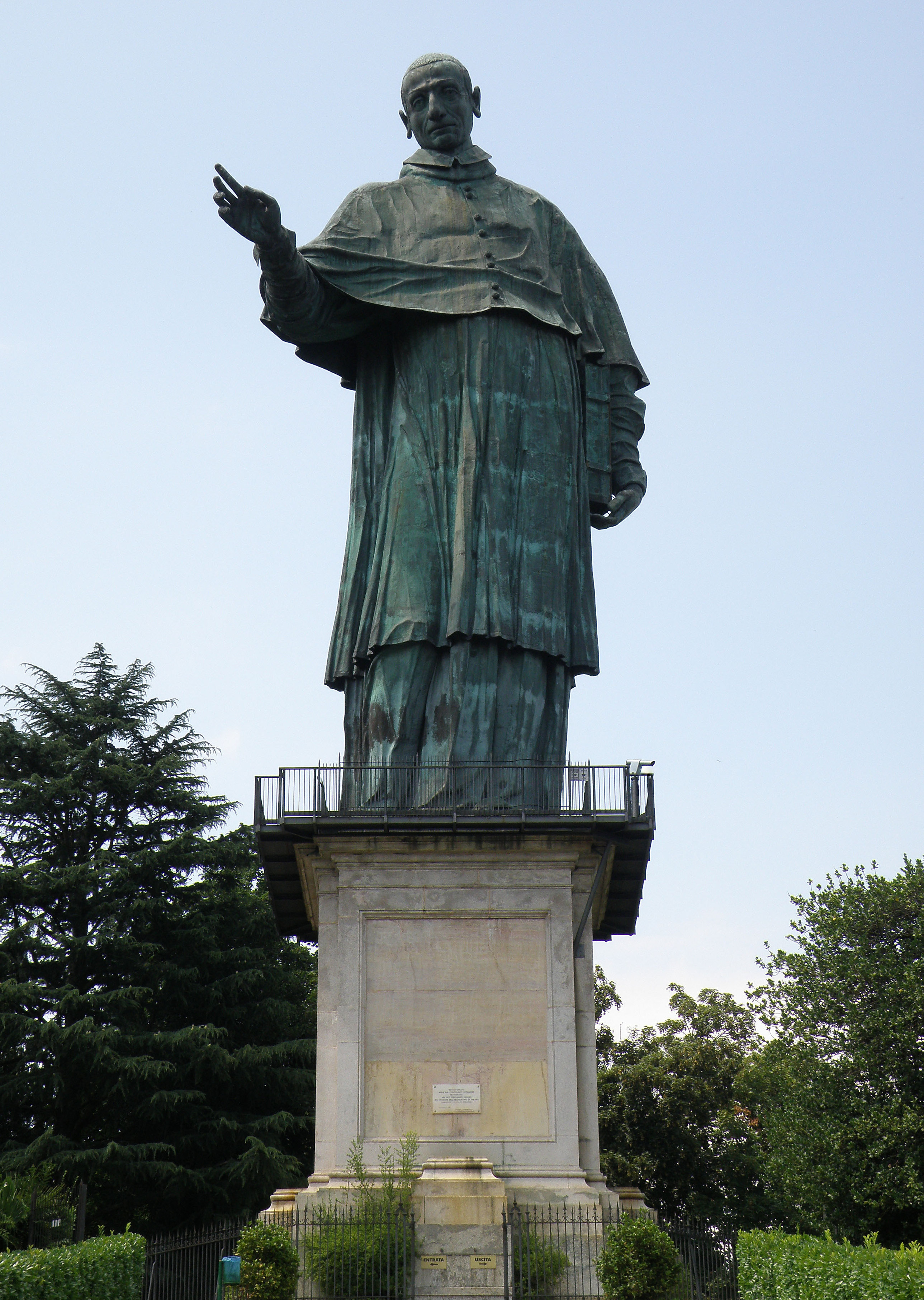 Arona (NO). Colosso di San Carlo Borromeo, detto il Sancarlone.